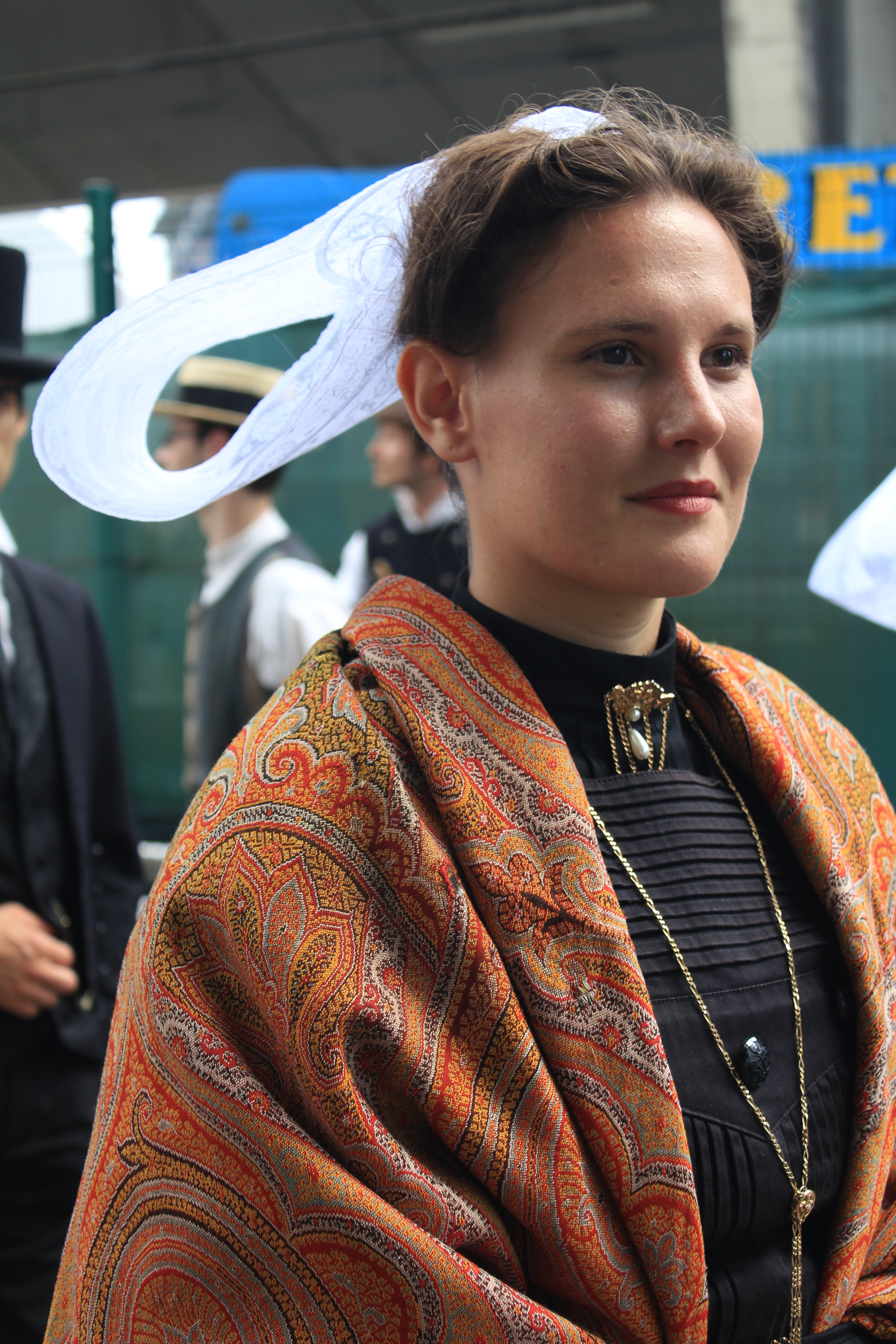 coiffe de la région de Guingamp lors de la grande parade du festival interceltique de Lorient 2013.